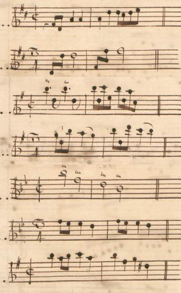 Table du volume XI des manuscrits de Parme (incipit des sonates 1 à 7, K. 388 à 394). NB : Petit montage, pour suivre le catalogue Kirkpatrick, pour les quatre premières sonates (K. 390, 391 et 388, 389).